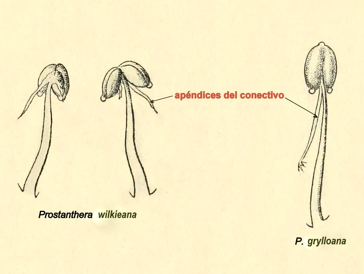 Prostanthera grylloana y P. wilkiena en Adolf Engler, Botanische Jahrbucher fur Systematik, Pflanzengeschichte und Pflanzengeographie, vol. 35: p. 527 , 1905 - Estambres con los apéndices del conectivo.